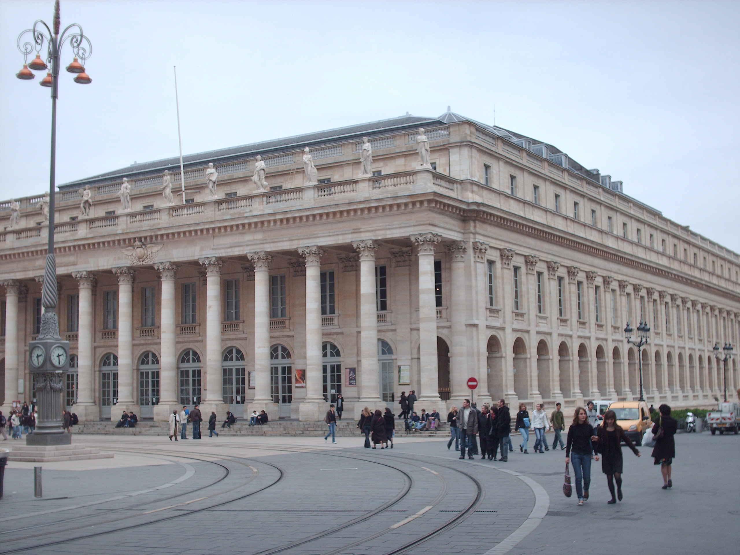 Grand théâtre de Bordeaux